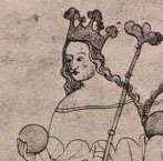 Kunhuta Uherská Kunigunde von Halitsch